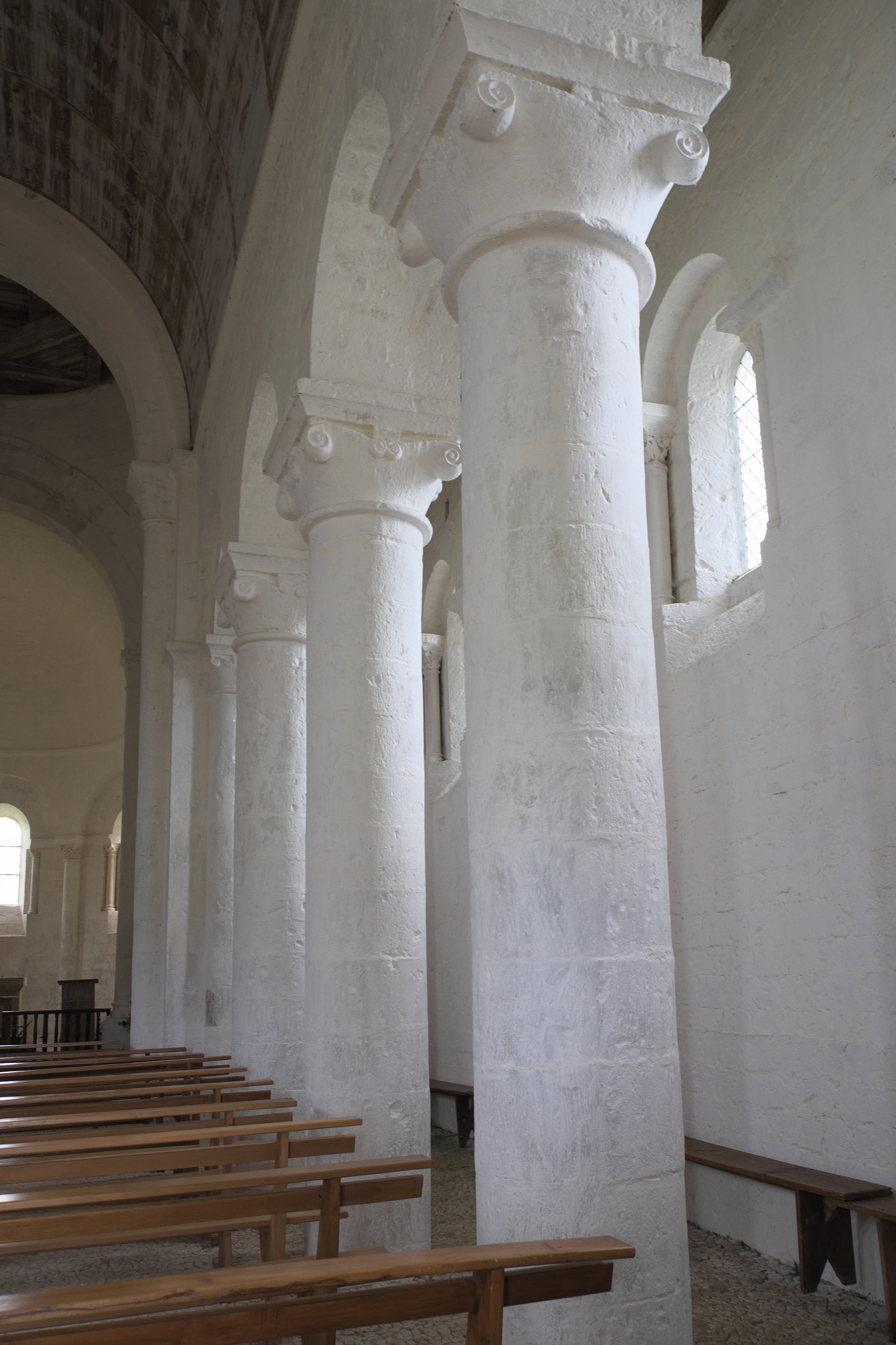 Katholische Kirche Saint-Denis in Lichères im Département Charente (Nouvelle-Aquitaine/Frankreich), Innenraum